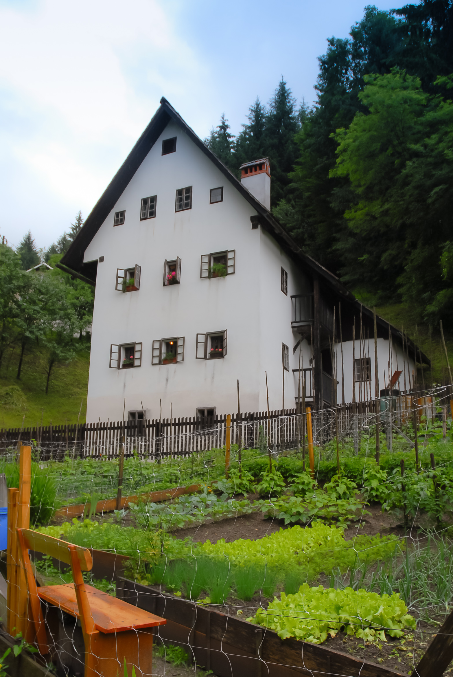 Idrijska rudarska hiša.